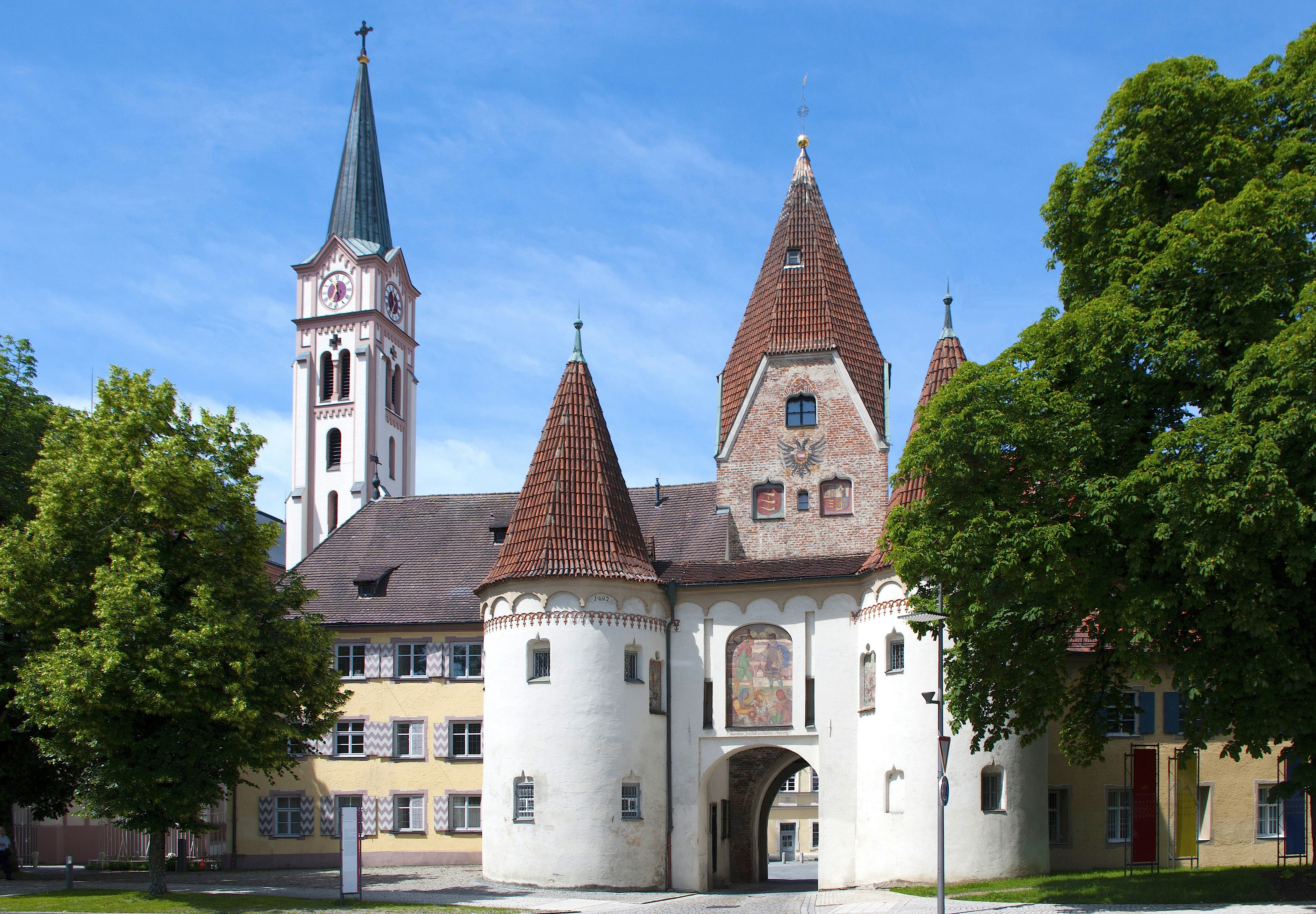 Oberes Tor (1470/89), ehem. Rathaus (1576/1761) und Stadtpfarrkirche Mariä Himmelfahrt (1864–72)